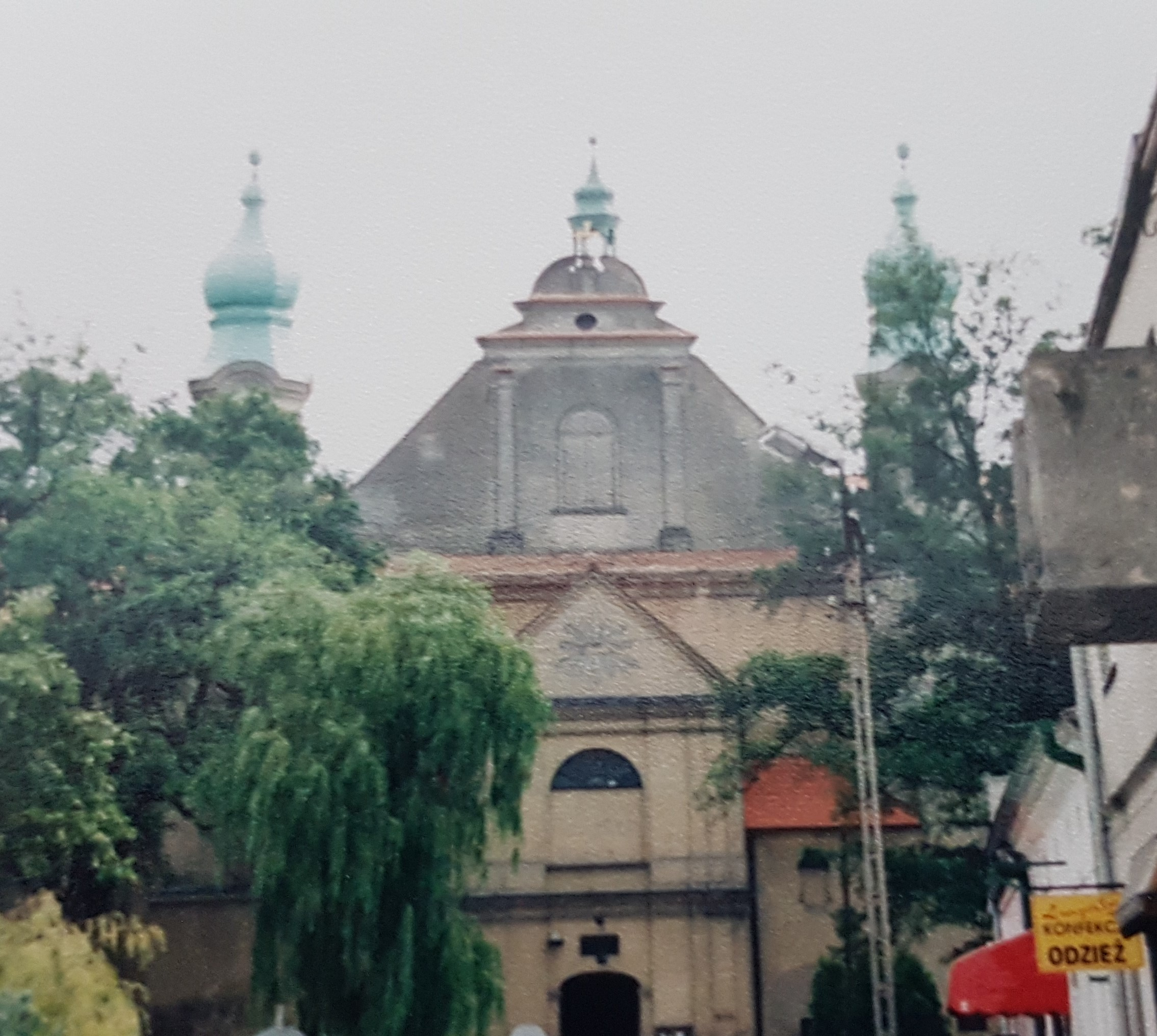 הכנסייה בה רוכזו יהודי הגטו, במשך שלושה ימים,קודם גירושם לחלמנו ולגטו לודז'